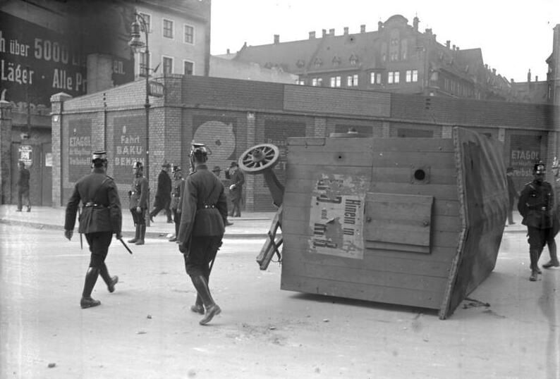 Die grossen Mai-Unruhen in Berlin! Ein von den Kommunisten als Barrikade umgeworfener Bauwagen am Bülowplatz in Berlin wird von der Polizei Geräumt.